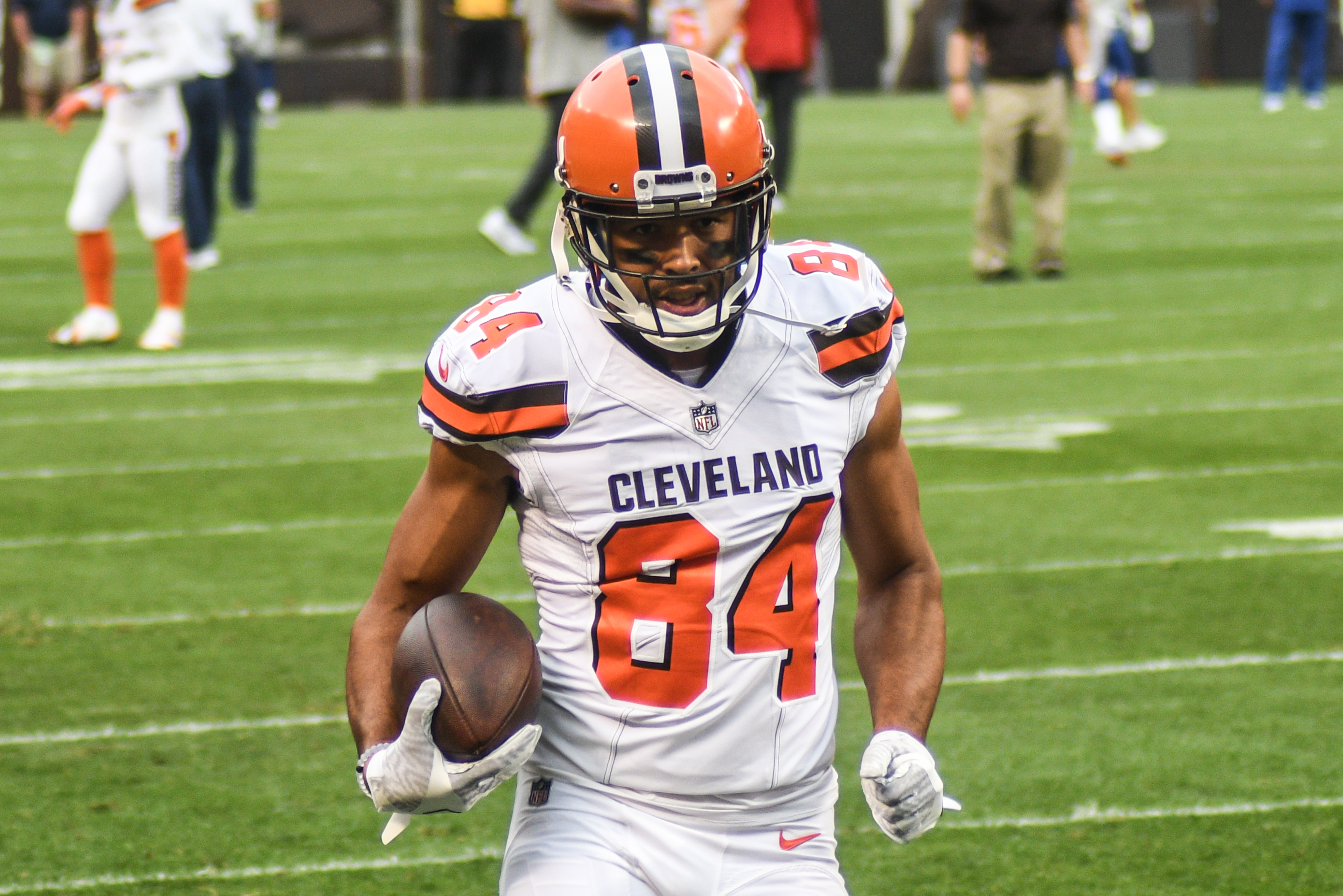 Jordan Payton